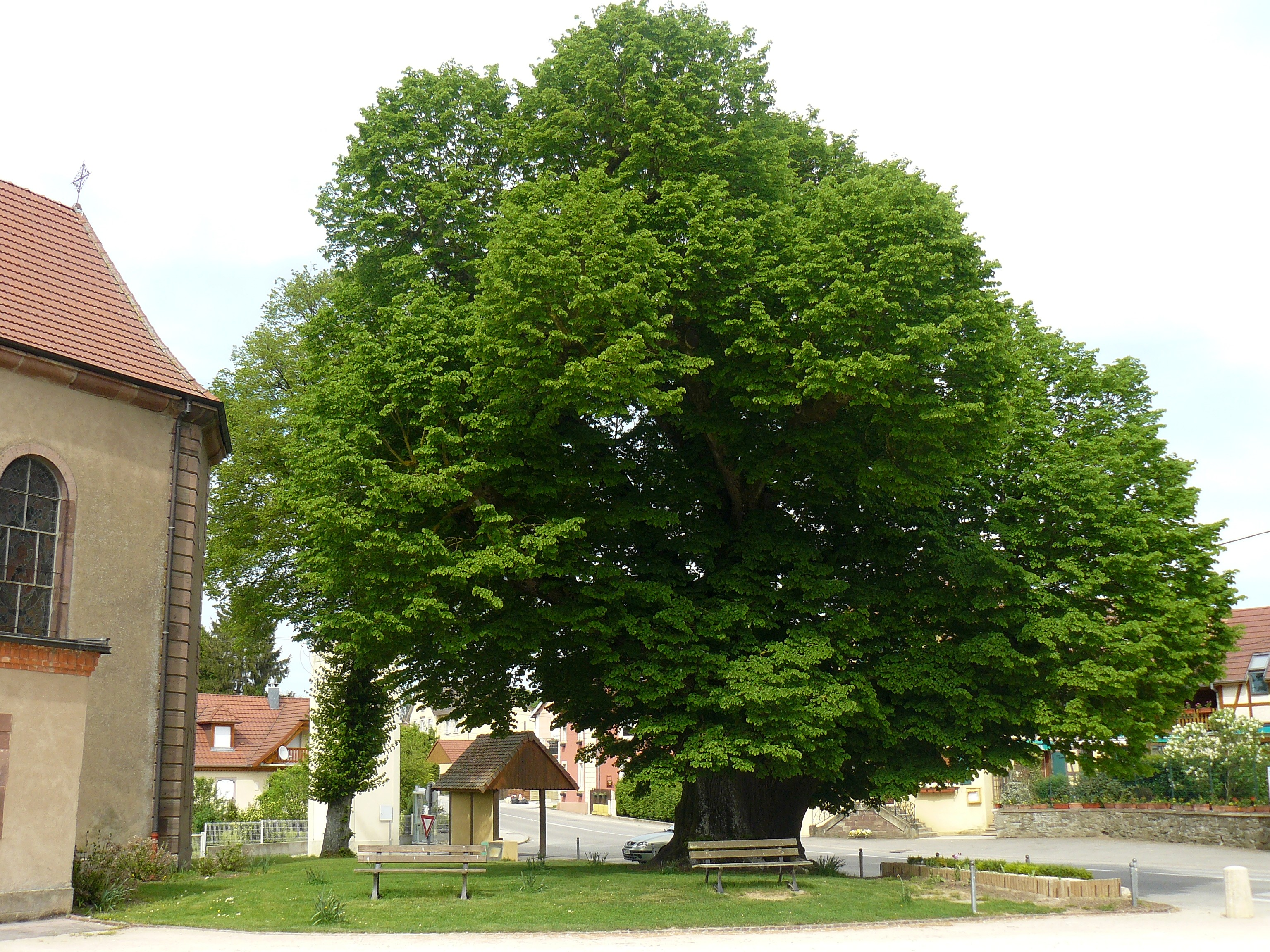 Tilleul de Turenne à Fontaine (Terr. de Belfort, France)